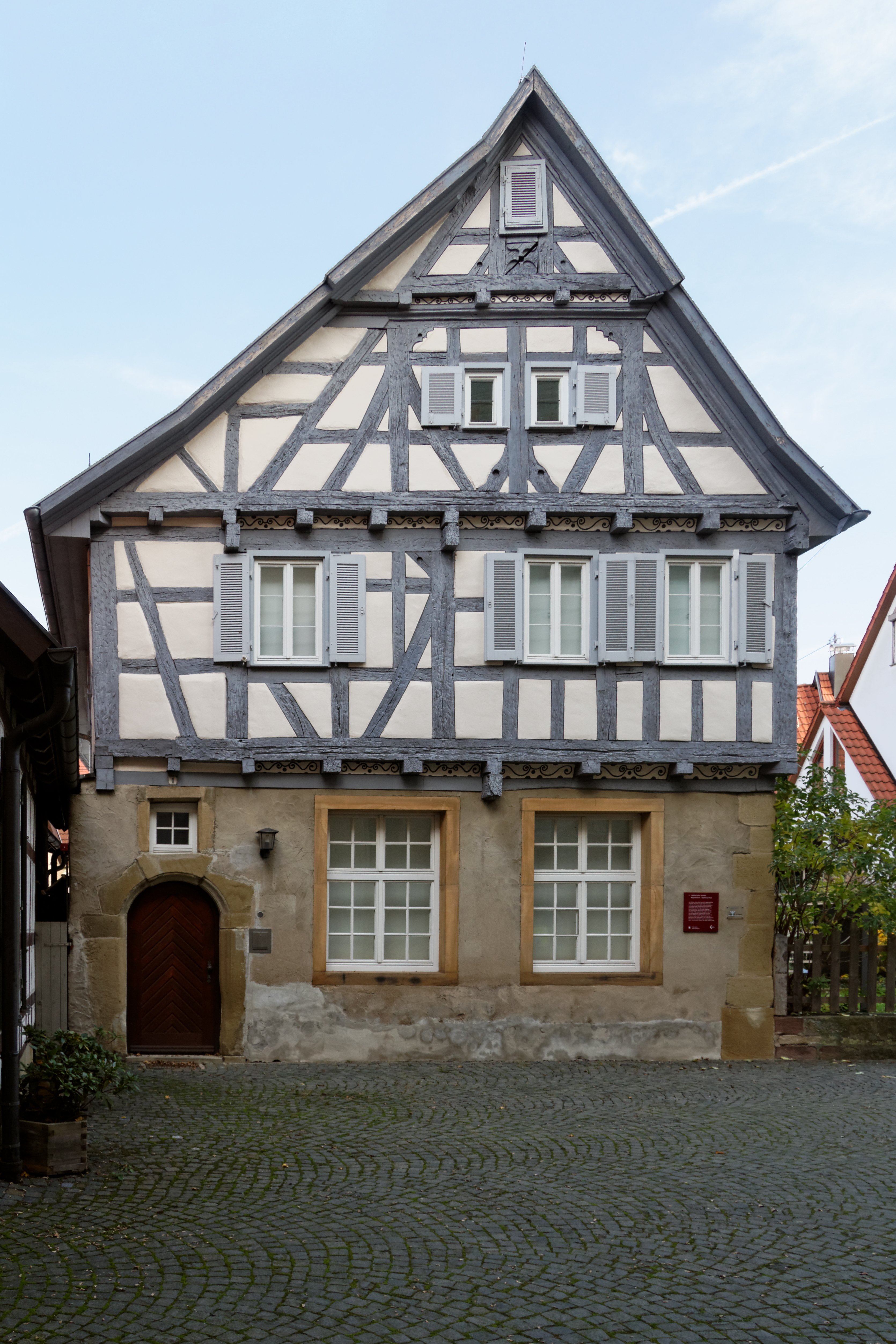 Ehemalige Lateinschule in Leonberg, heute als Heimatmuseum genutzt. Johannes Kepler besuchte die Schule in den Jahren 1577-1583.